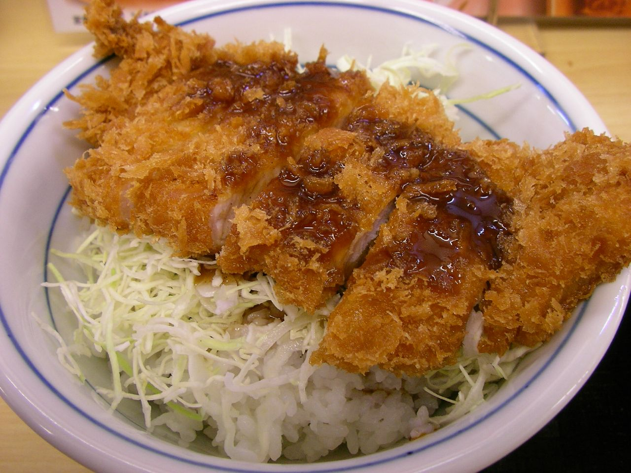 ソースカツ丼＋とん汁 (かつや・渋谷道玄坂店)